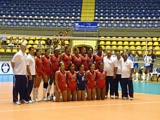 La nazionale di pallavolo femminile della Repubblica Dominicana alla Piemonte Woman Cup 2010